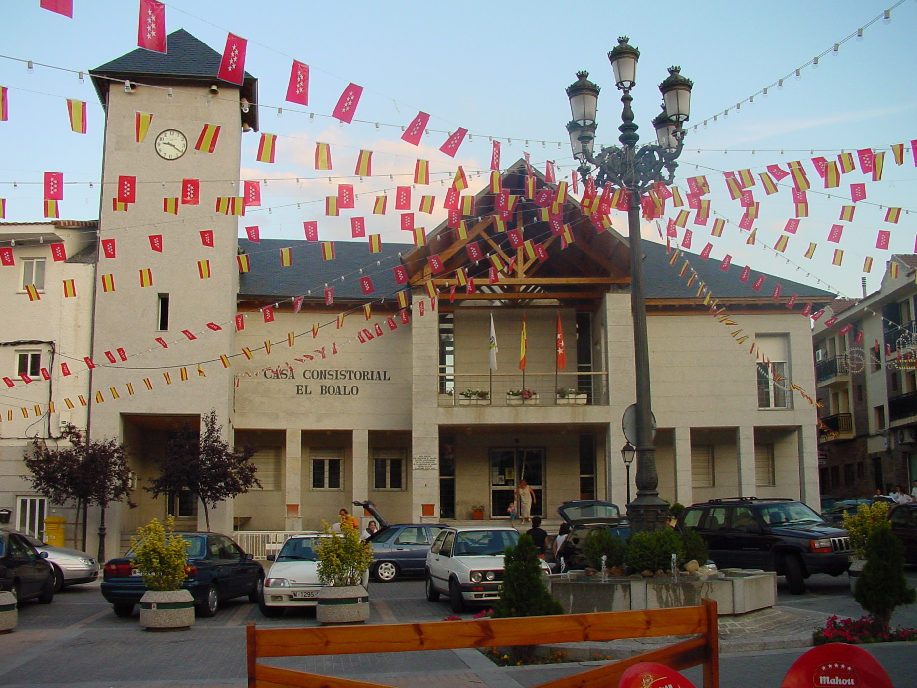 Ayuntamiento de El Boalo.